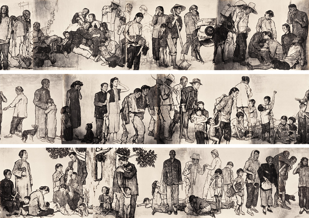 中文（中国大陆）: 由四川画家蒋兆和所绘，内容为因抗日战争而流离失所的中国战争难民。